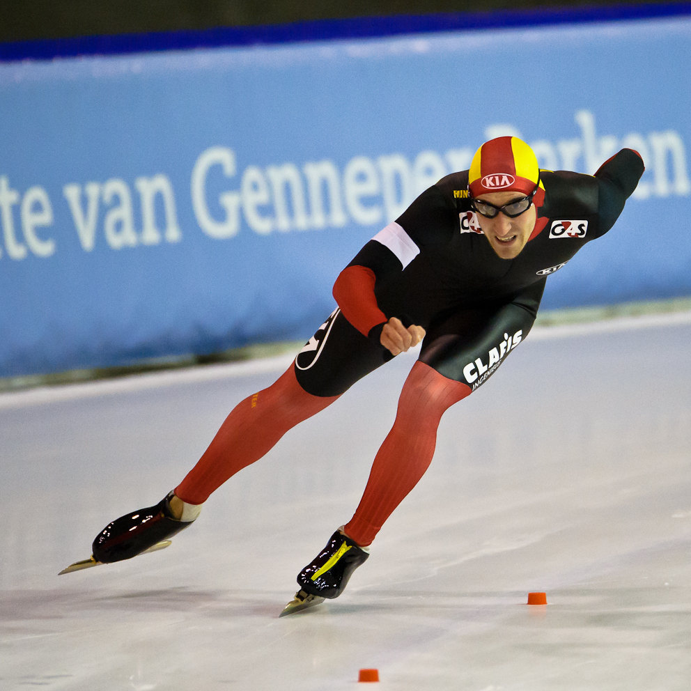 Belgisch kampioenschap hardrijden 2013